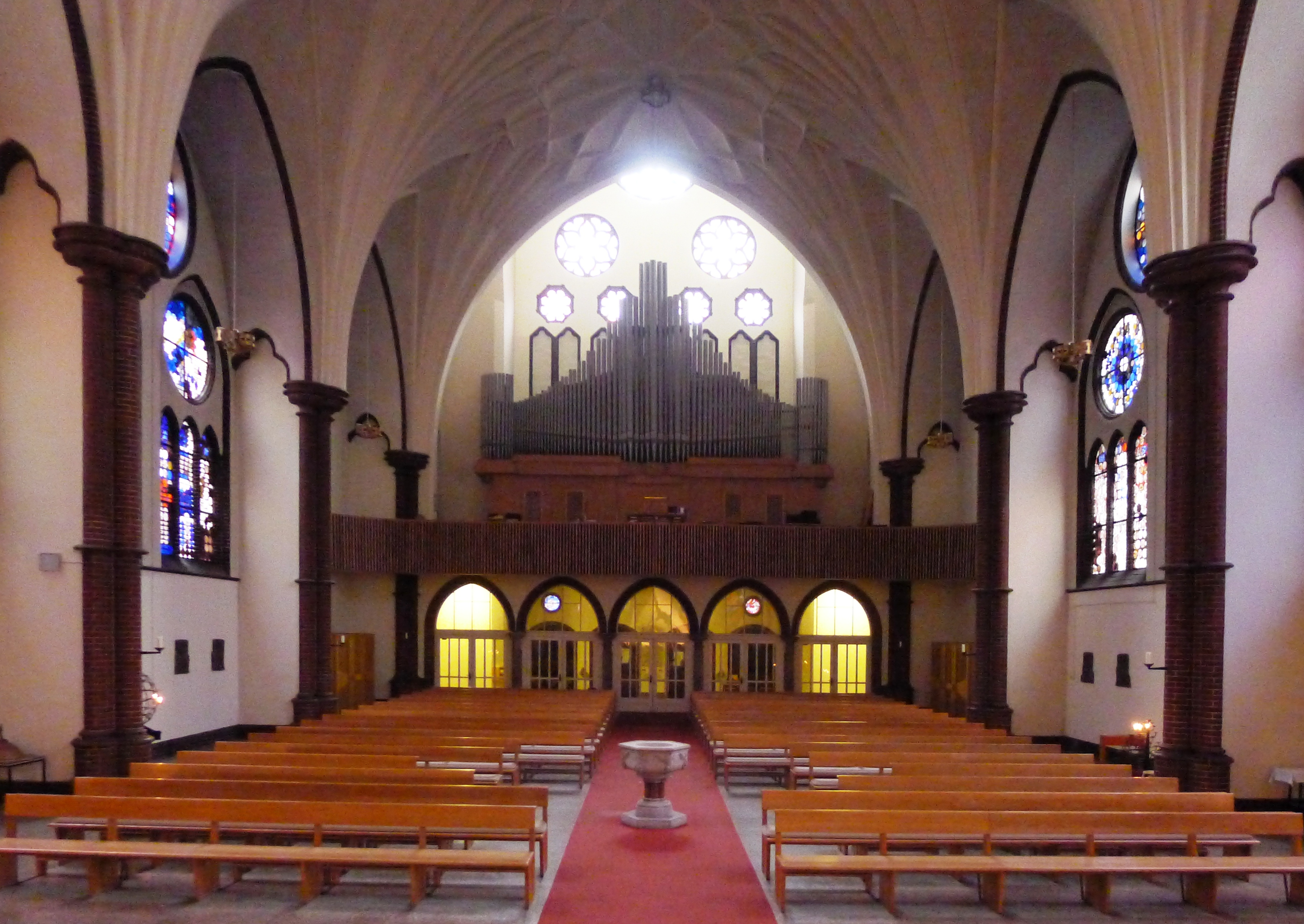 Blick vom Altar in Richtung Orgelempore über der Eingangshalle